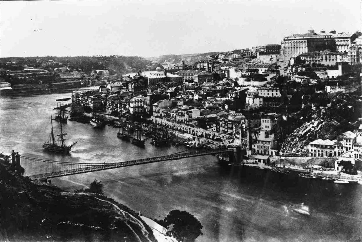 Ponte pênsil do Porto